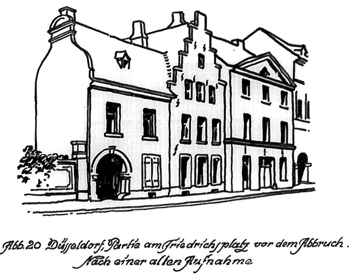 Paul_Sültenfuß,_Das_Düsseldorfer_Wohnhaus_bis_zur_Mitte_des_19._Jahrhunderts, (Diss._TH_Aachen),_1922,__Abb.20_Düsseldorf,_Partie_am_Friedrichsplatz_vor_dem_Abbruch.jpg